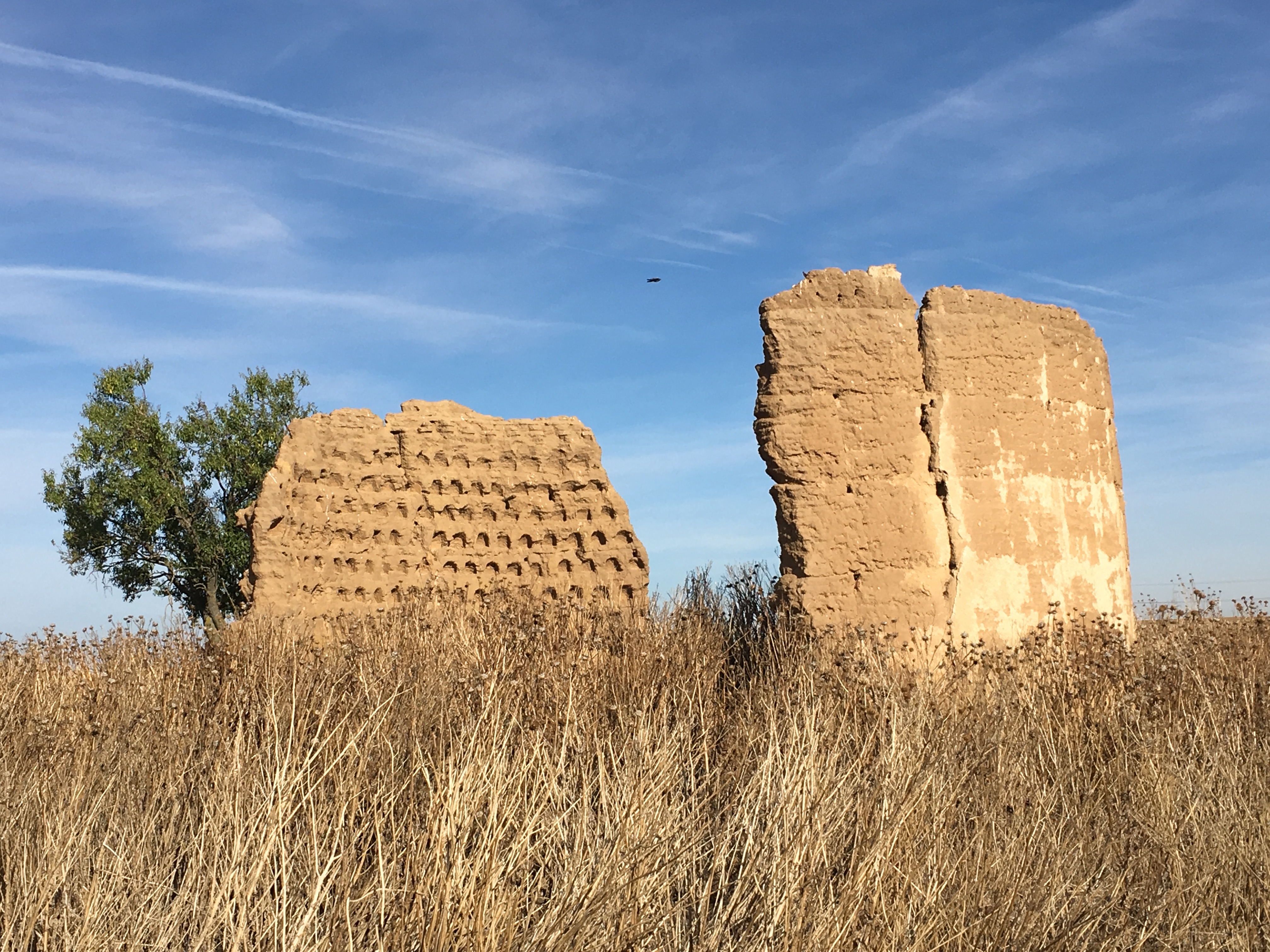 Villaesper Milenario